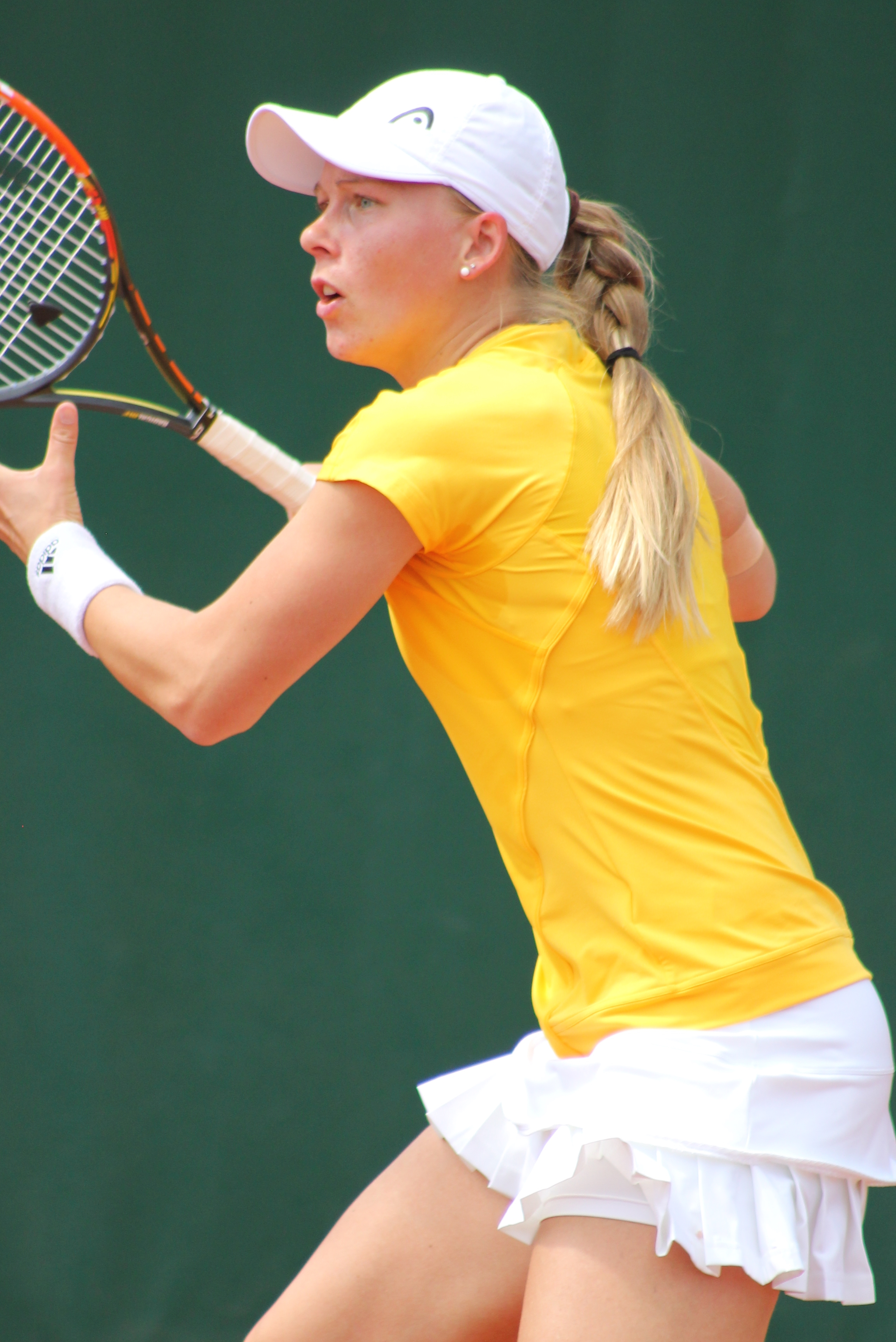 Larsson RG15 (8)